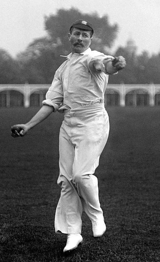 Cyril Mowbray Wells, Middlesex, circa 1905.